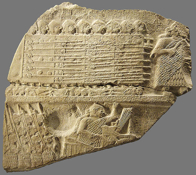 Bassorilievo in pietra calcarea, monumento per celebrare la vittoria di Eannatum di Lagash su Enakalle di Umma.